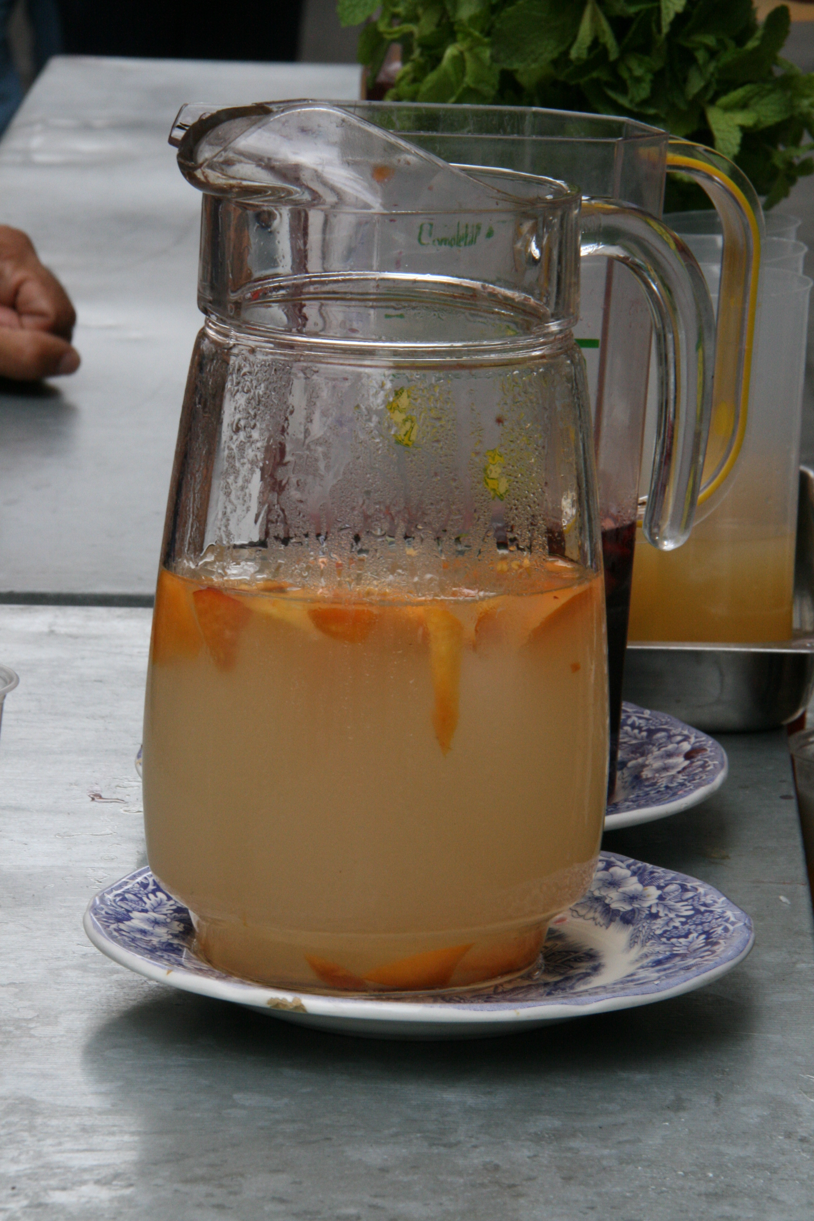 Limonada